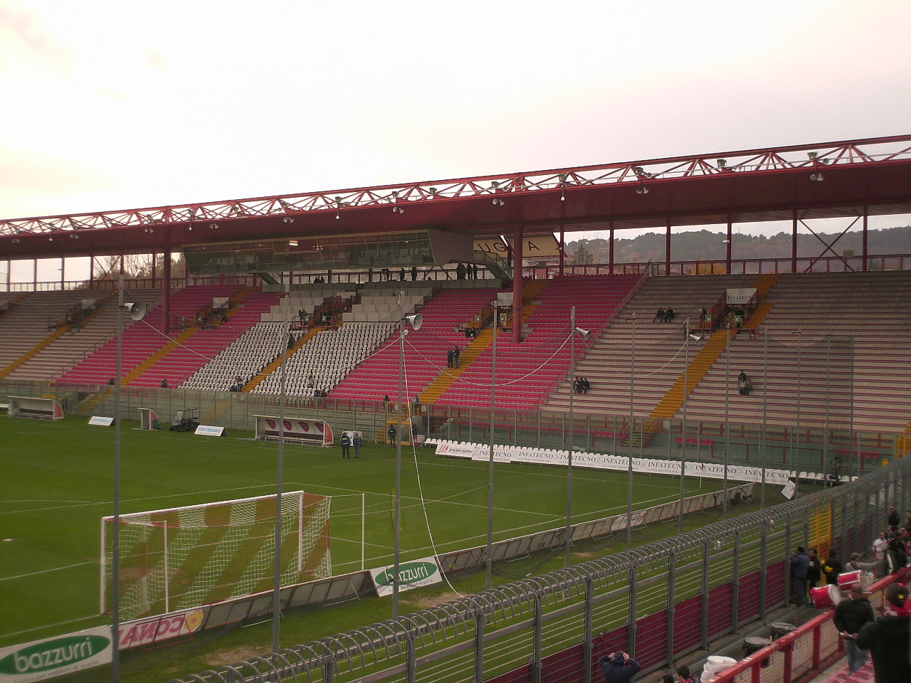 Perugia, Stadio "Renato Curi". Foto di user:Grifomaniacs, 2 dicembre 2006.